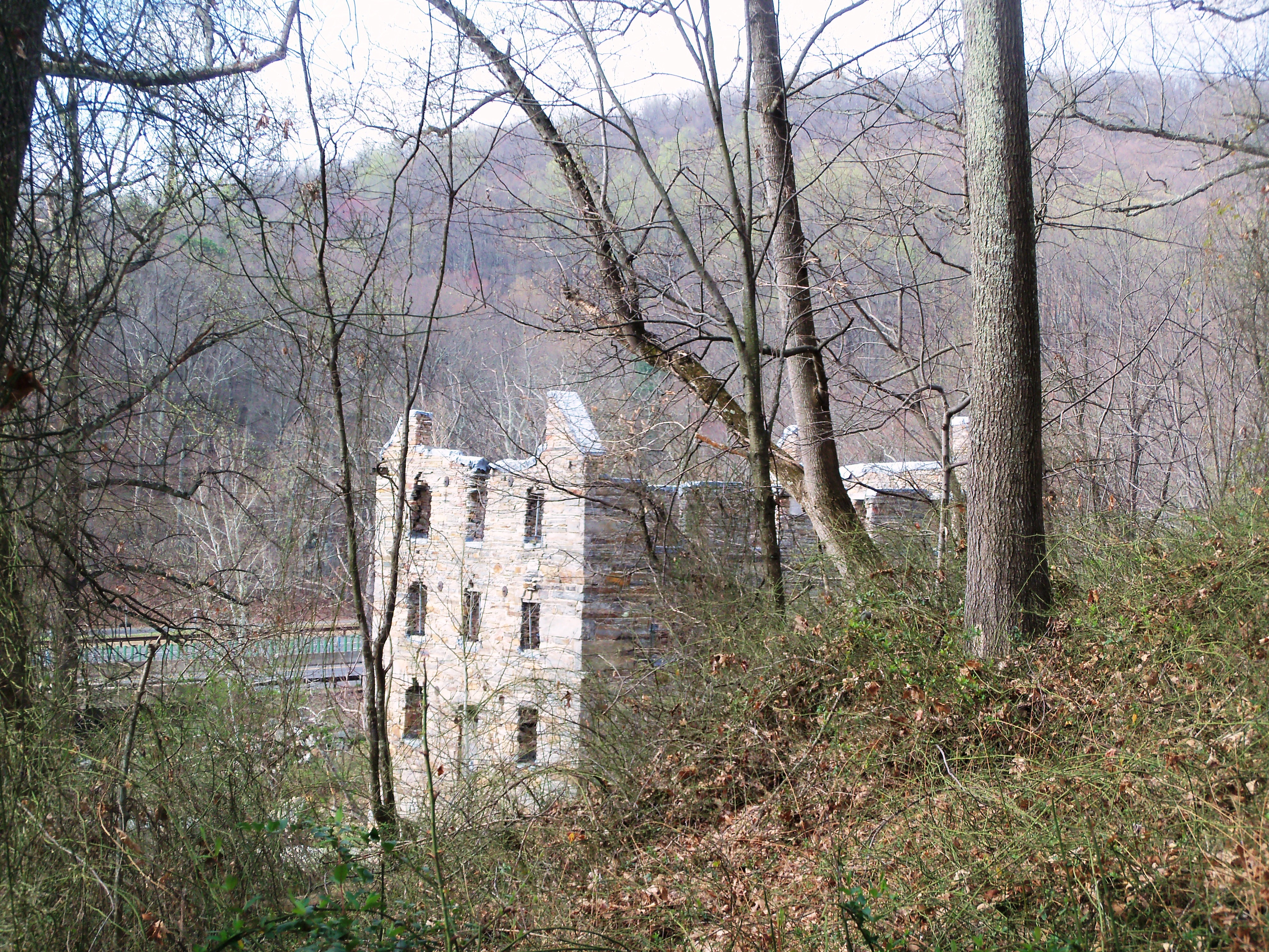 Gainesville, VA, USA Beverly Mill